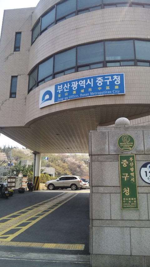 釜山広域市中区庁の入口です。